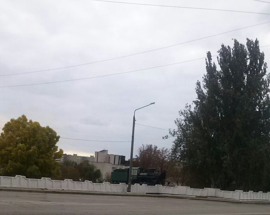 Перший паровоз «Кп4-456» на Запорізькій дитячий залізниці